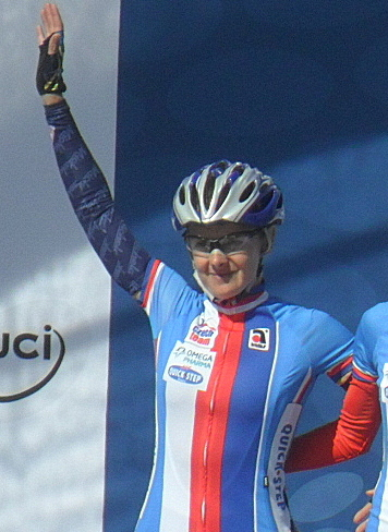 Ploegenpresentatie Tsjechië voor de start van het Wereldkampioenschap 2012 in Valkenburg, Nederland.